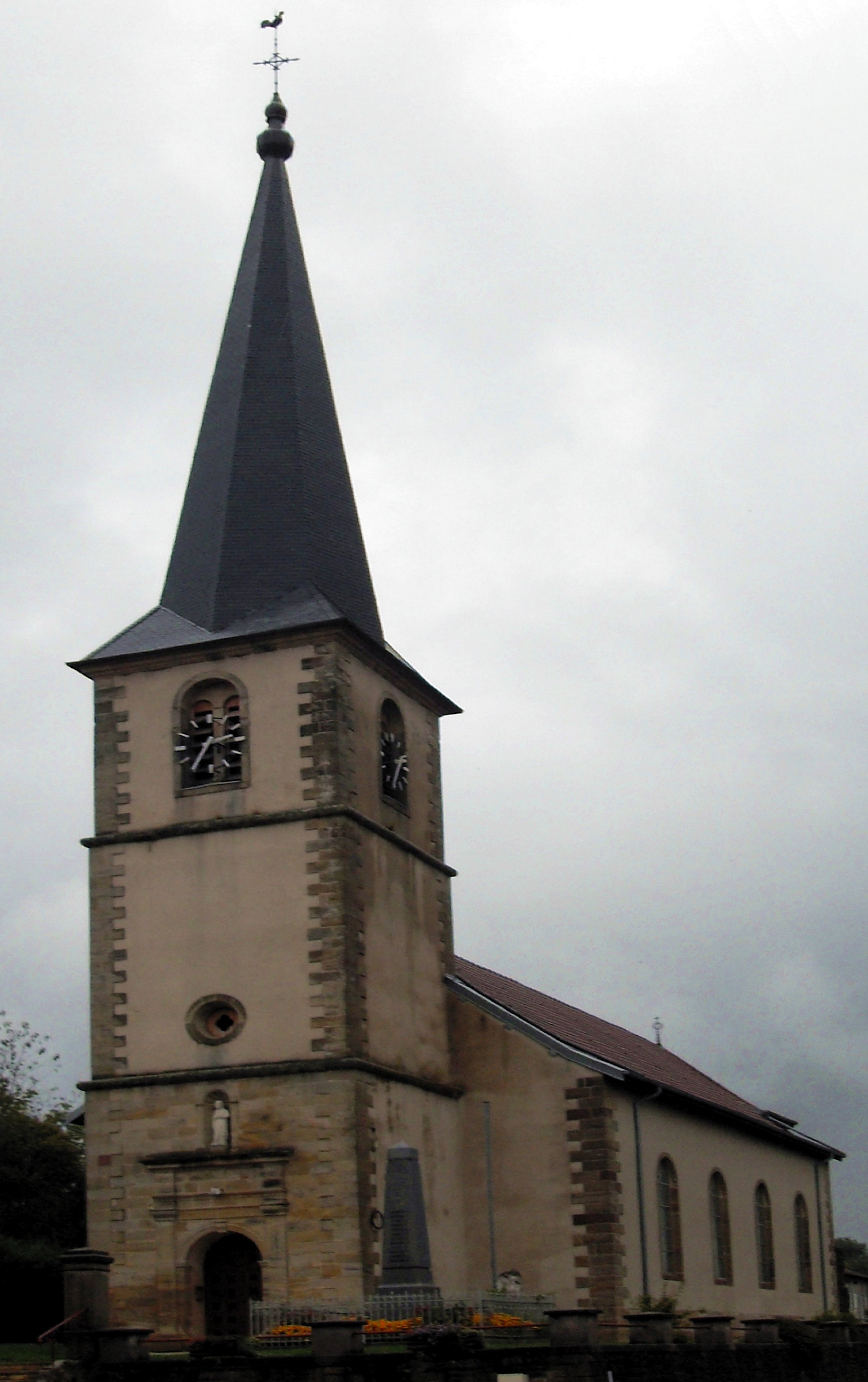 L'église Saint-Barthélemy de Lerrain